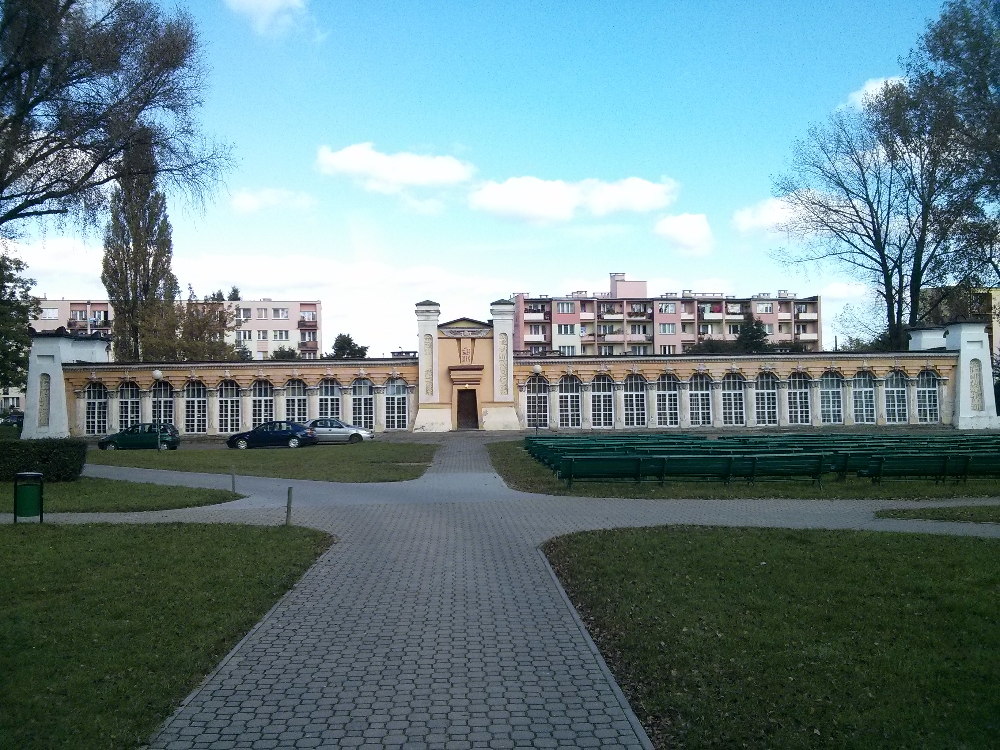 Końskie, oranżeria egipska, 1825 r., widok z S